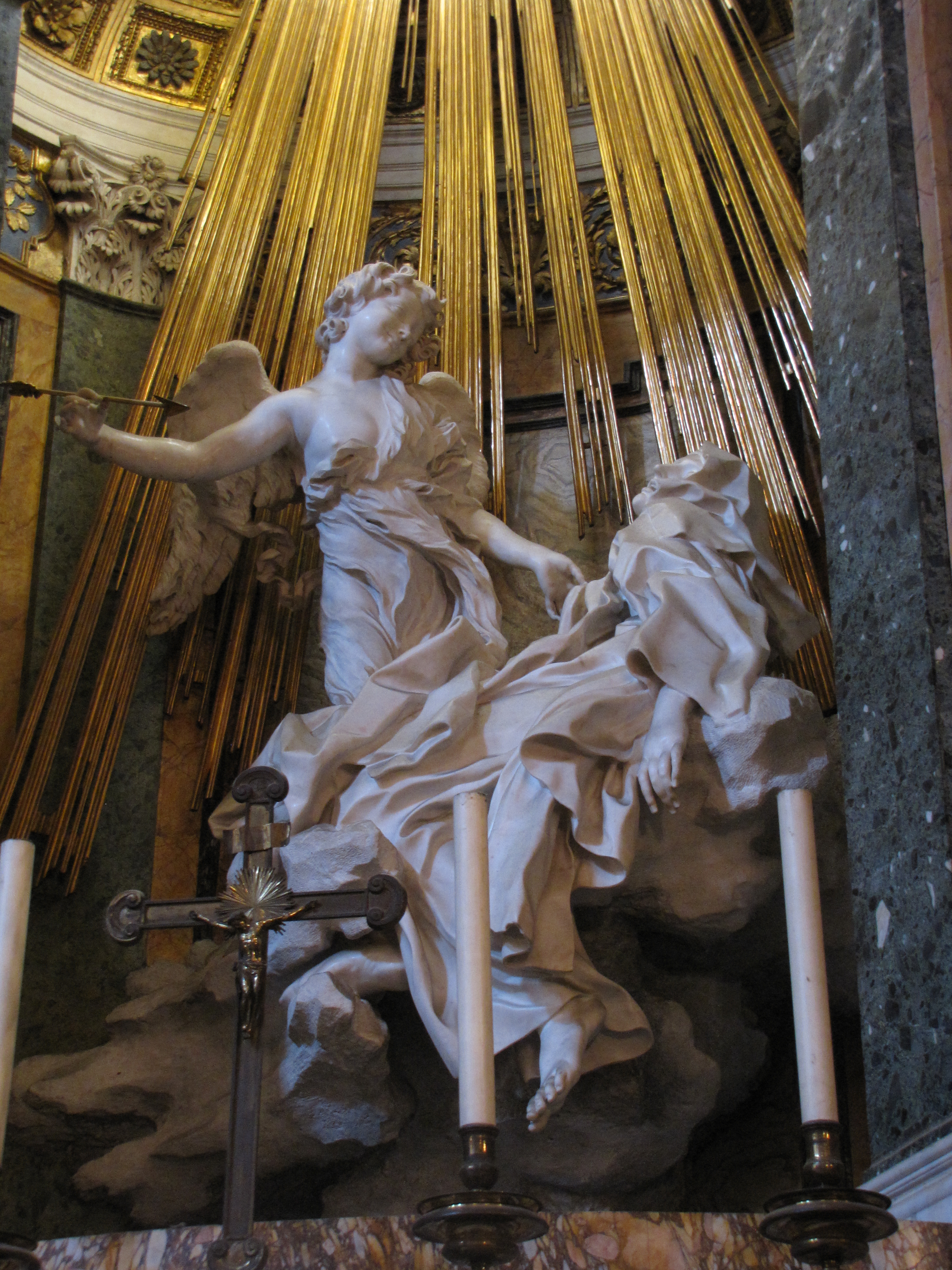 Extase van Teresa - Basilica di Santa Maria della Vittoria - Rome